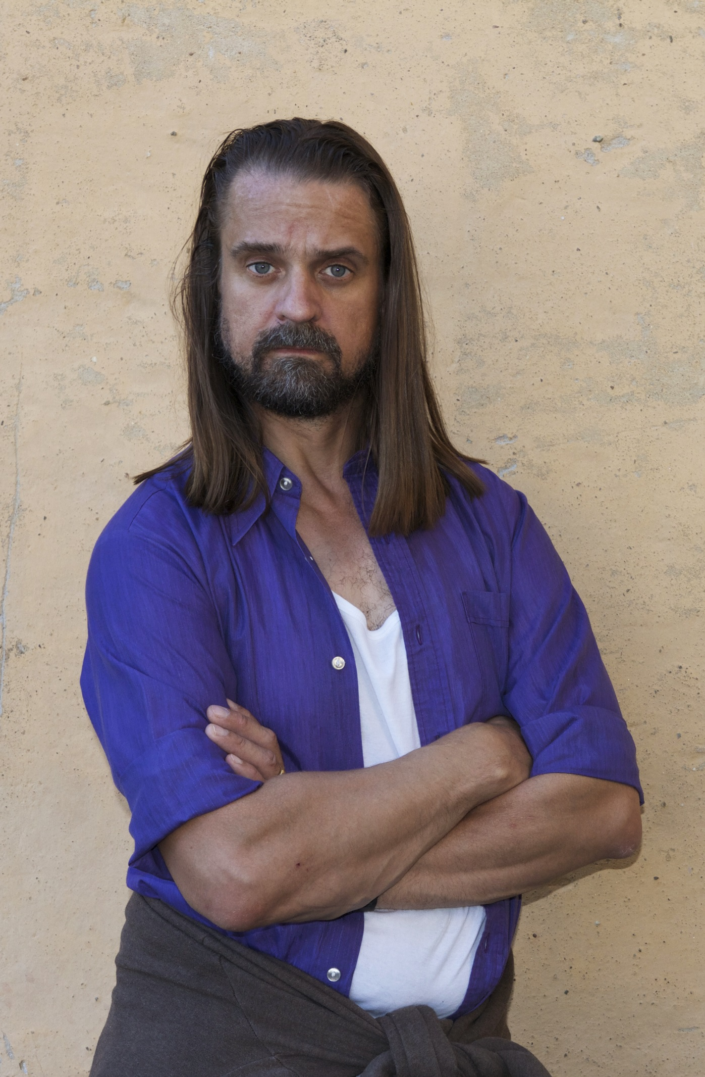 Fredde Granberg som Timo i Bastuklubben.